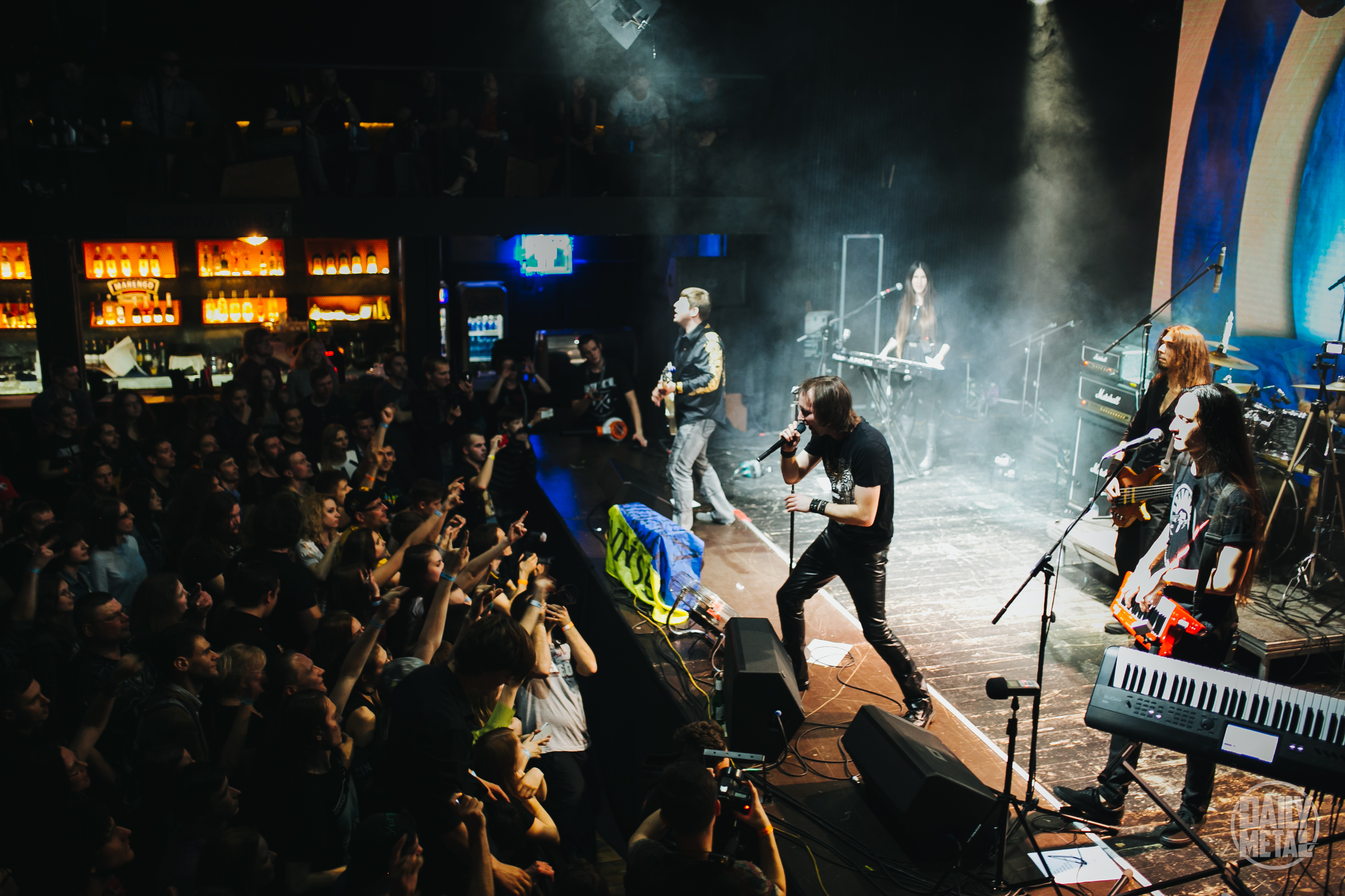 Виступ гурту SUNRISE в київському клубі 'Atlas, великий сольний концерт на підтримку нового альбому, 10.04.2016.